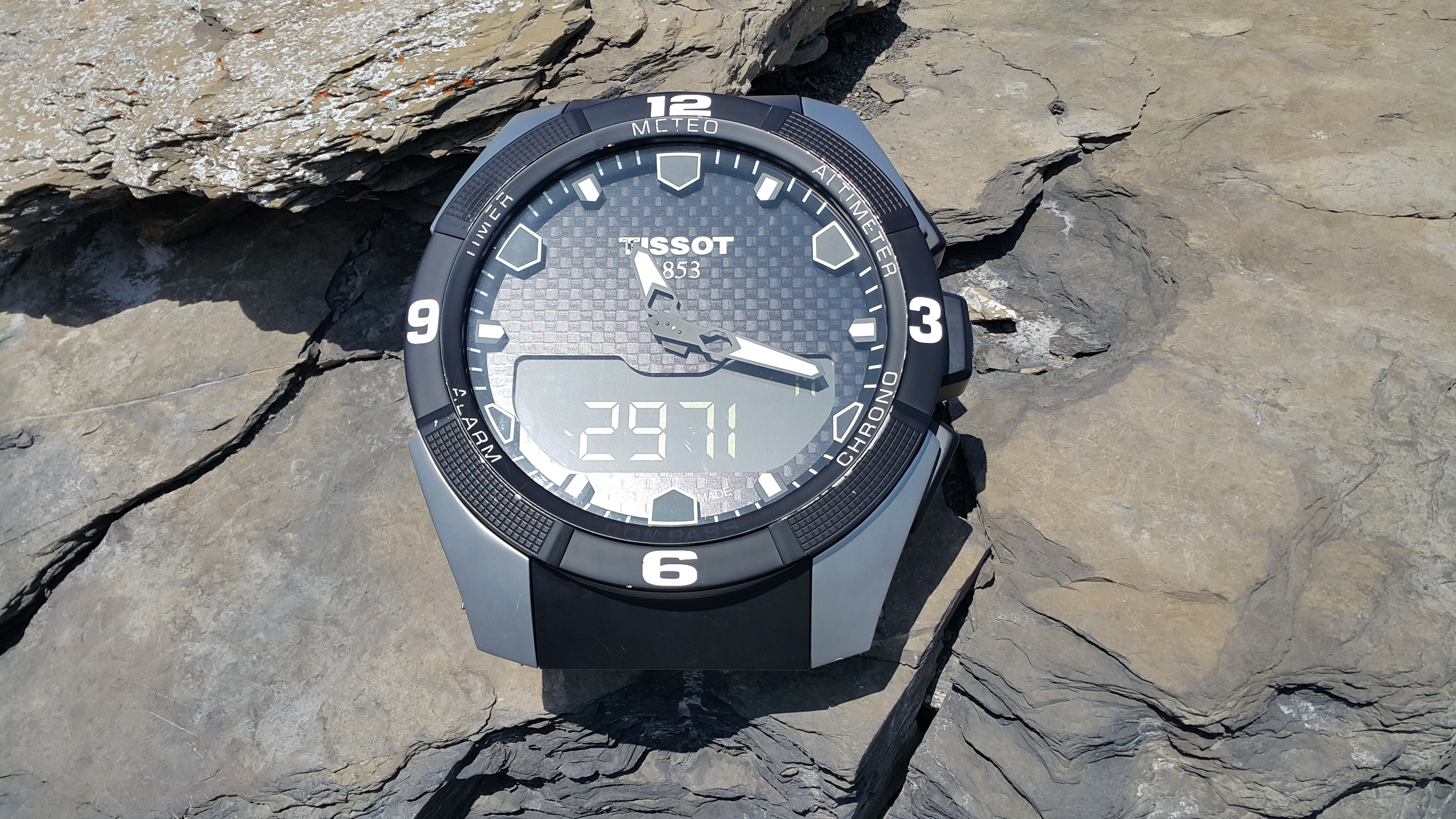 טסנפלאורון (קרחון)